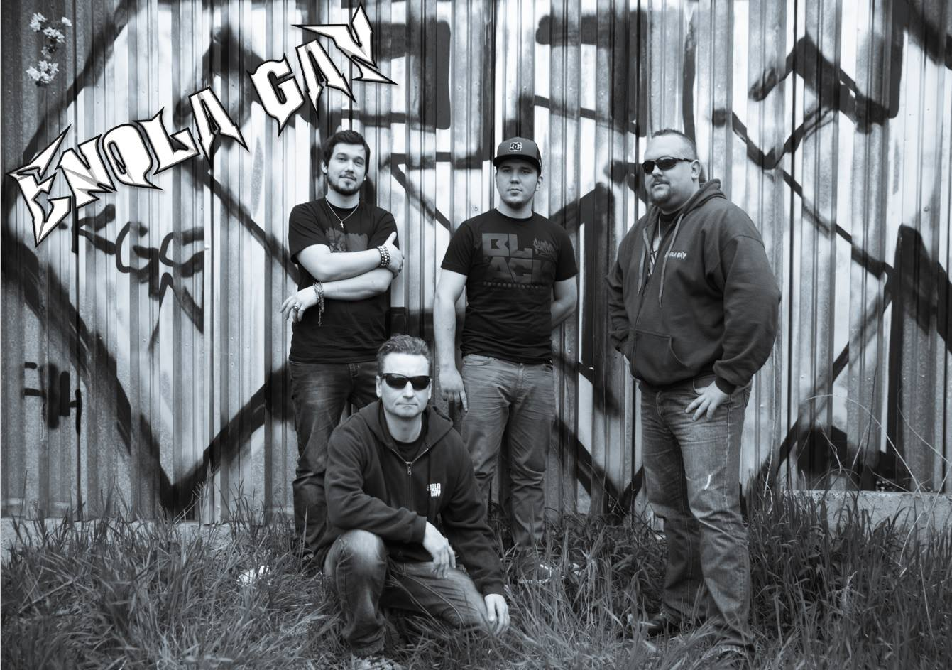 Enola Gay